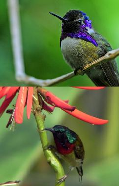 Convergent evolution